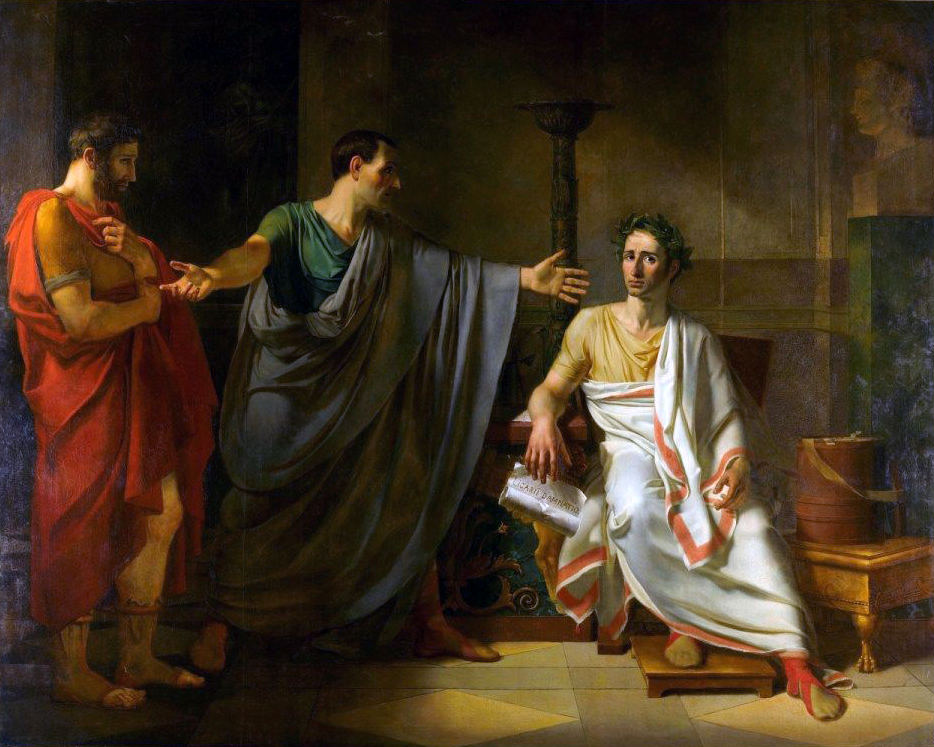 Cicéron défendant Quintus Ligarius devant Jules César.